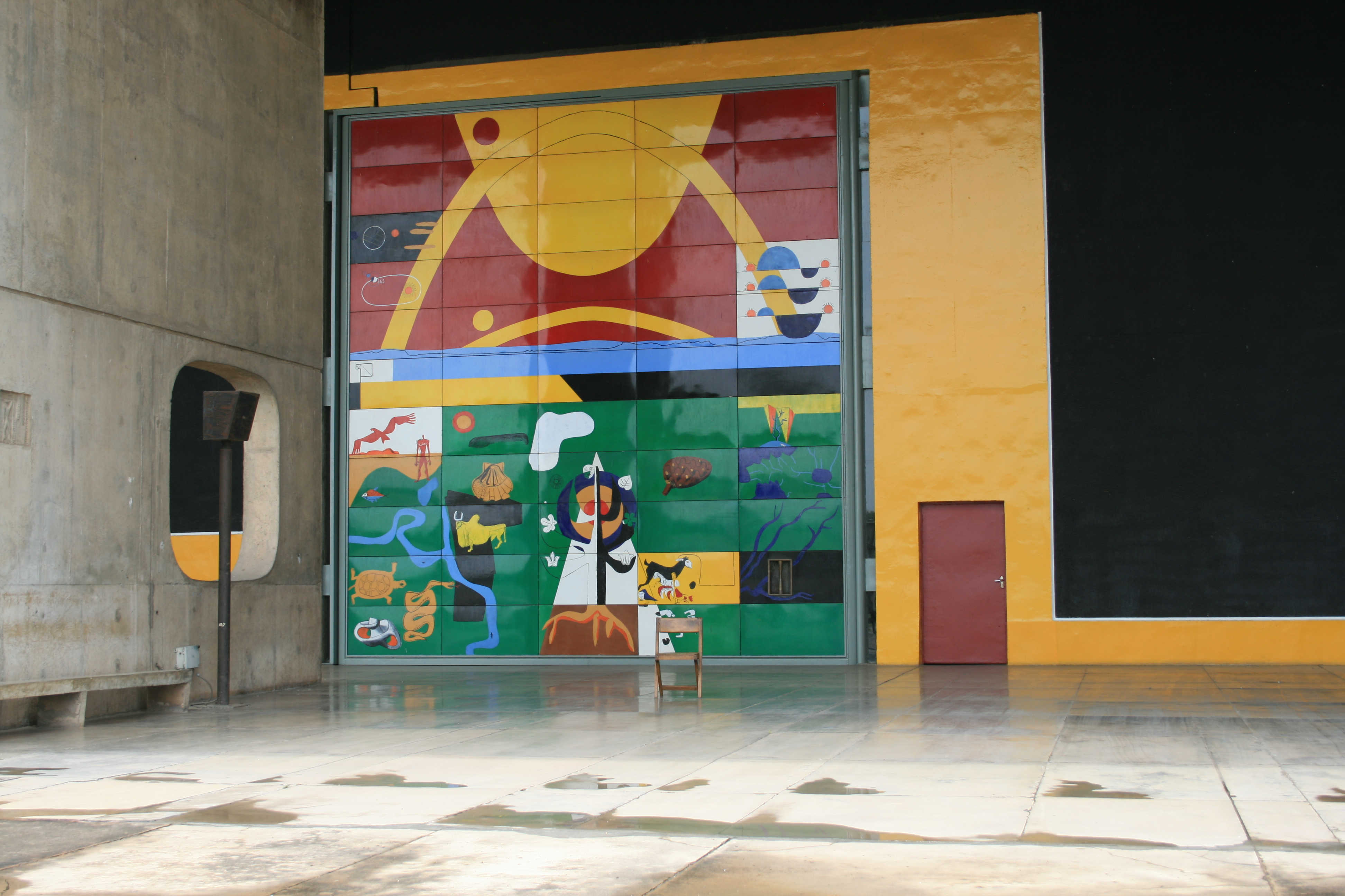 Corbu's Door